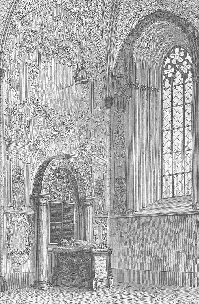 Drottning Katarina Jagellonicas gravvård i Uppsala domkyrka.